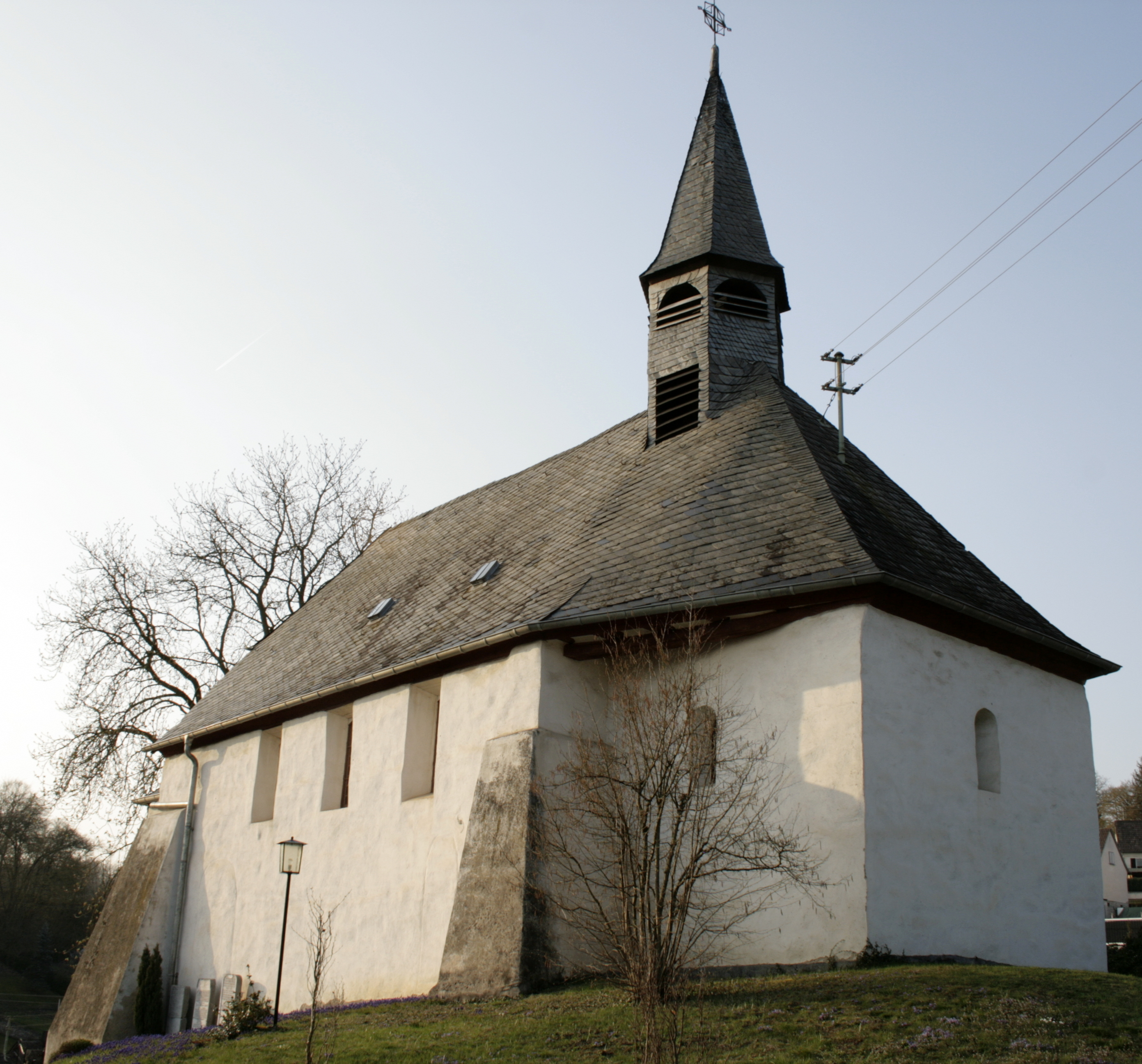 Johanneskapelle in Steeden, Deutschland